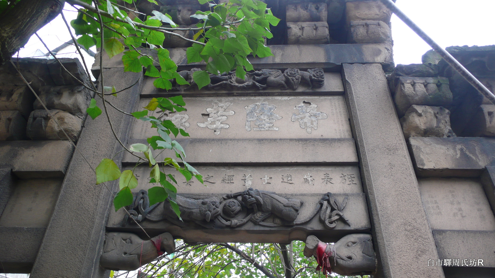 重慶白市驛周氏坊